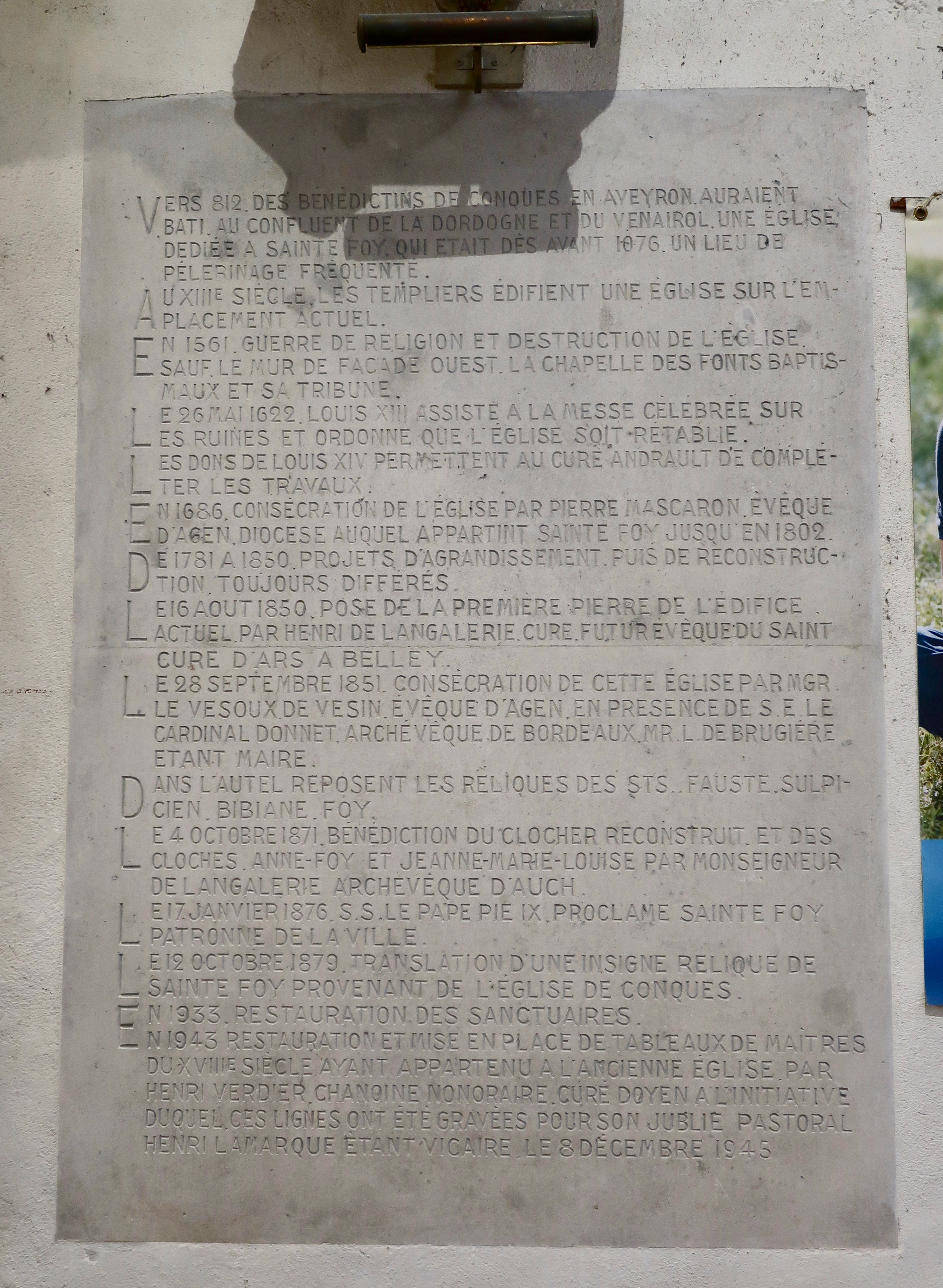 Plaque historique dans l'église Notre-Dame de Sainte-Foy-la-Grande (Gironde).